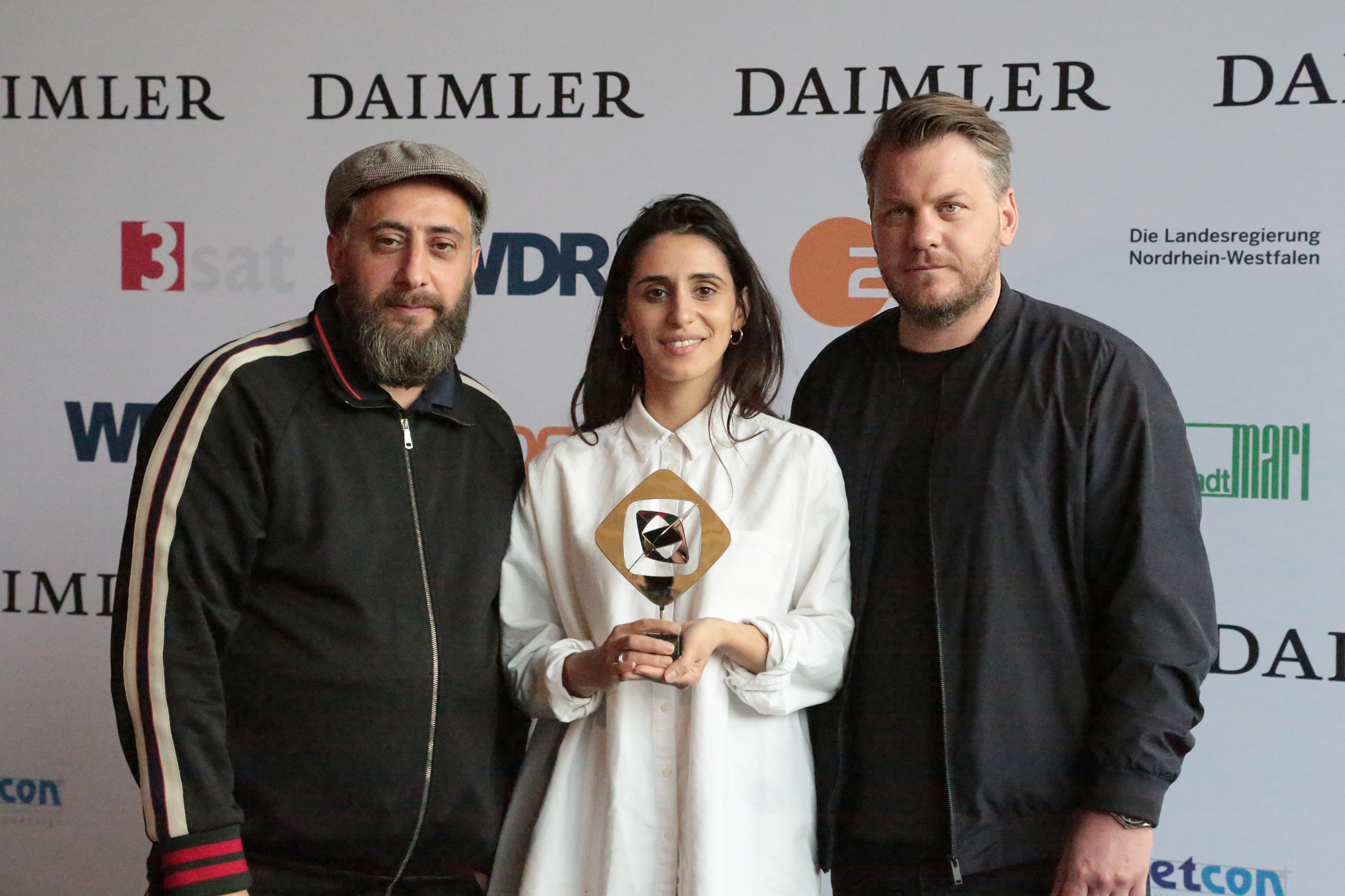 Kida Khodr Ramadan, Maryam Zaree, Marvin Kren (4 Blocks) beim Grimme-Preis 2018, am 13.04.2018 in Marl.